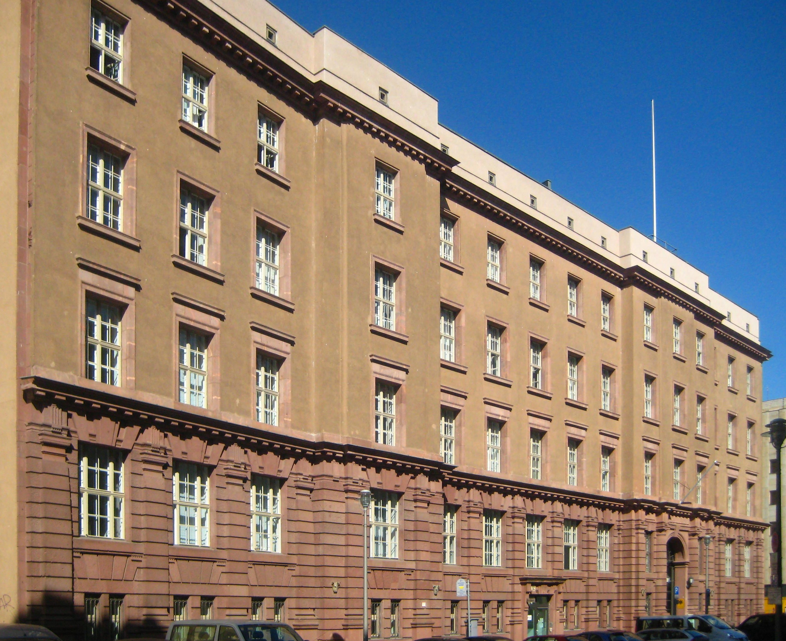 Der Berliner Dienstsitz des Bundesamts für Verbraucherschutz und Lebensmittelsicherheit in der Mauerstraße 39-42 in Berlin-Mitte. Das neobarocke Gebäude mit roter Sandsteinfassade entstand 1900-1901 nach einem Entwurf der Architekten Heinrich Joseph Kayser und Karl von Großheim für die Nordstern-Lebensversicherung. 1914 erwarb die Deutsche Bank, die ihre Zentrale auf zwei benachbarten Blöcken an der Mauerstraße aufgebaut hatte, das Gebäude und ließ es als Block III angliedern. Der Architekt Hans Jessen baute das Gebäude um, bewahrte dabei aber die originale Fassadengestaltung. Gleichzeitig schuf er einen Anbau an der Mauerstraße 35-38, der aber nicht erhalten ist. Das Nordstern-Gebäude wurde nach Schäden im Zweiten Weltkrieg Anfang der 1950er-Jahre vereinfacht wieder hergestellt. Vom ursprünglich reichen Fassadendekor blieb vor allem ein Relieffries an der Nordseite (nicht abgebildet) erhalten. In der DDR-Zeit wurde das Gebäude (zusammen mit den beiden anderen Deutsche Bank-Blöcken und einem benachbarten Neubau) vom DDR-Innenministerium genutzt. Das Gebäude ist als Teil der Gesamtanlage Deutsche Bank denkmalgeschützt.